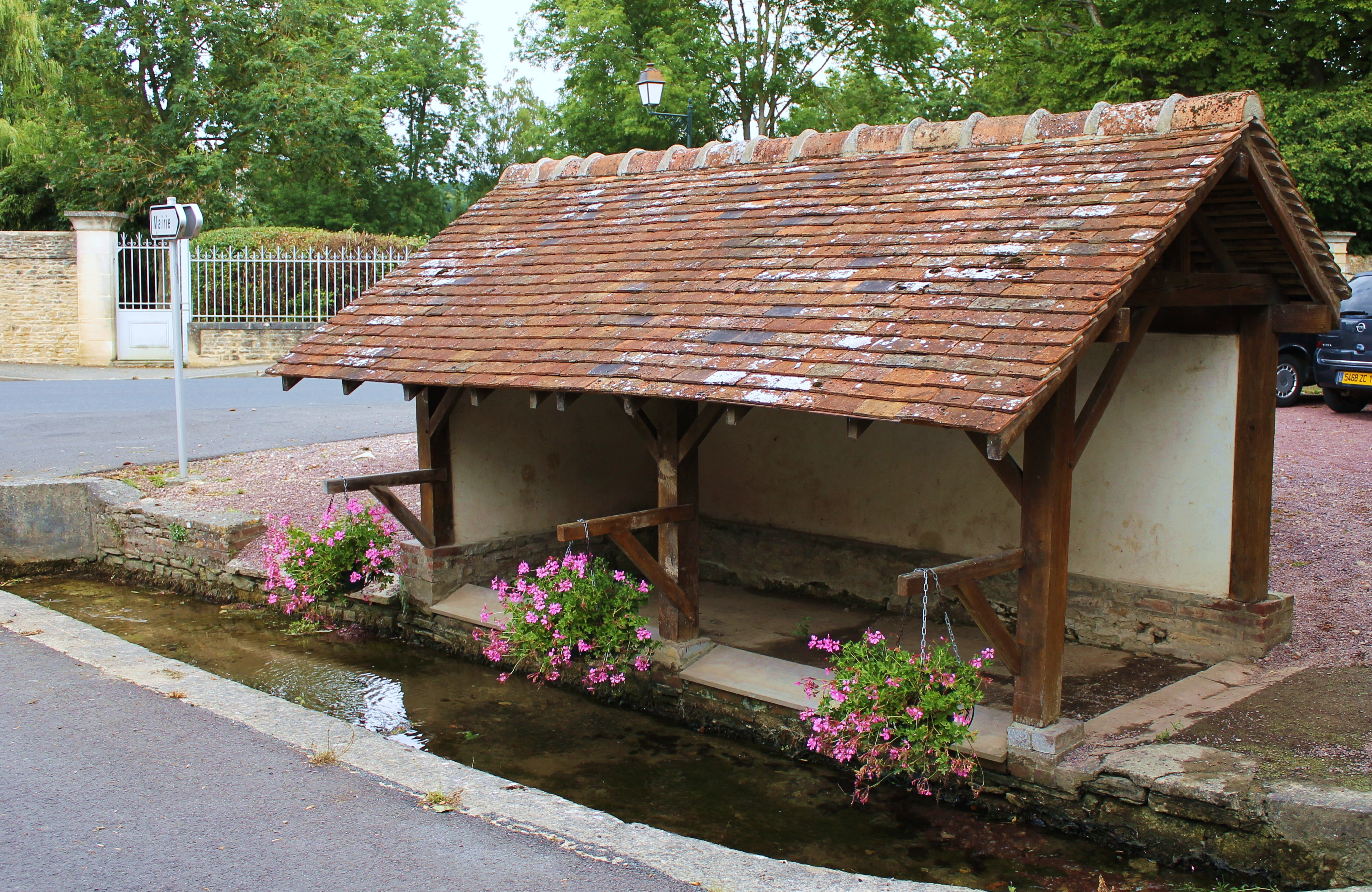 Lavoir à Ouézy (Calvados)